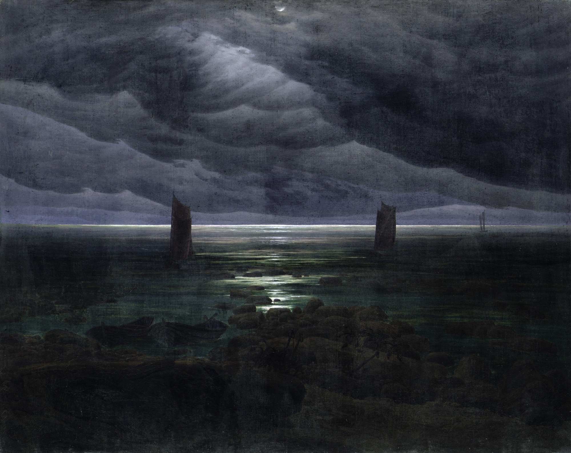 letztes Bild, das Friedrich vor seinem 1835 erlittenen Schlaganfall vollenden konnte (Hamburger Kunsthalle) und zweitgrößtes Format; das Thema "heimkehrende Schiffe" als Gleichnis endender Lebensfahrt und Symbol der Vergänglichkeit